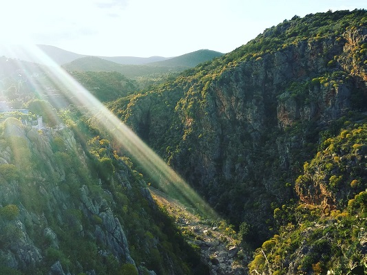 Το Φαράγγι του Βόθυλα